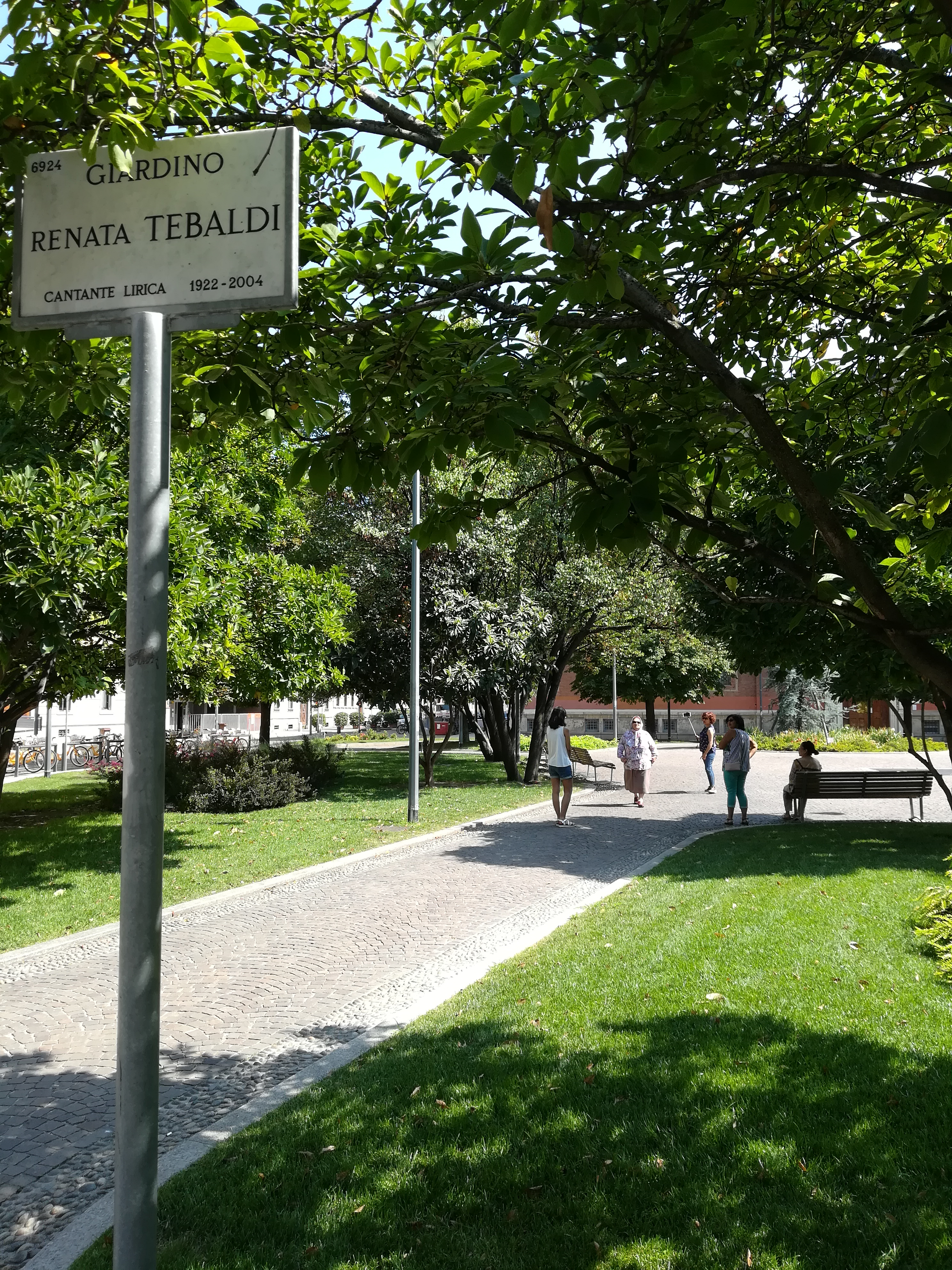 Giardino dedicato a Renata Tebaldi, Milano.